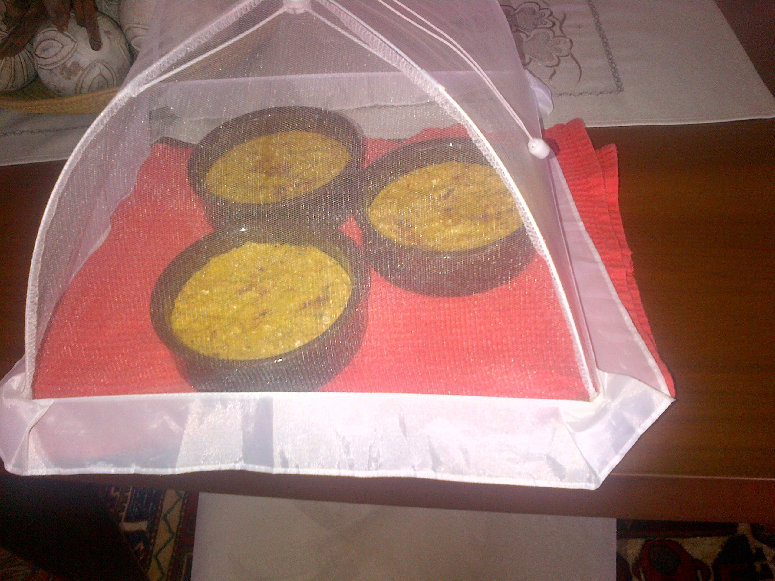 Un plato de maiz de la cocina chilena, es la version vegetariana de "pastel de choclo", o sea no tiene ni carne molida ni de pollo.